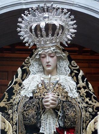 Nuestra Señora de la Soledad en su salida procesional del Viernes Santo de 2006.